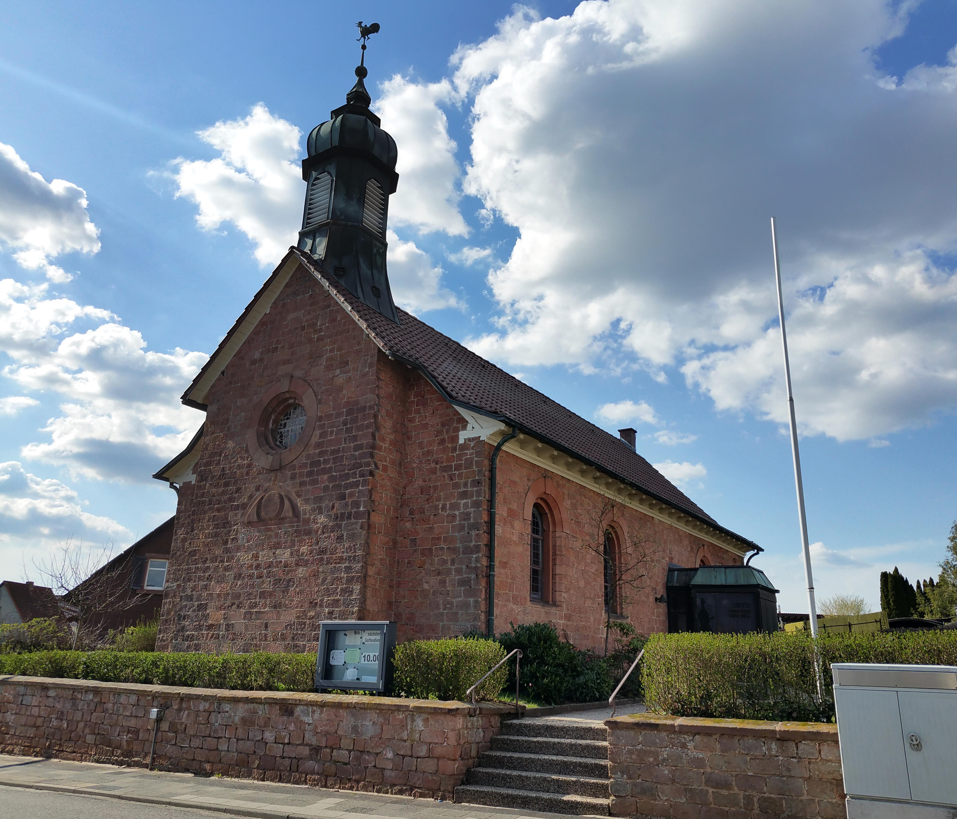 Evangelische Pfarrkirche Dansenberg